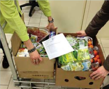 “Buon Fine” è il progetto di Coop Centro Italia per il recupero a fini sociali dei prodotti non più vendibili per difetti della confezione o perché vicini alla scadenza. Tonnellate di merce perfettamente commestibile destinate ad essere smaltite che invece, grazie a “Buon Fine”, vengono raccolte e destinate alla beneficenza, garantendone le condizioni di conservazione e igiene previste dalla normativa vigente.Dal 1º gennaio al 31 dicembre 2013 sono state effettuate 4.417 donazioni ( + 1.129 rispetto al 2012) alle Associazioni che hanno distribuito ai singoli soggetti prodotti per un valore di oltre 220.000 euro. Per quanto riguarda la riduzione dell’impatto ambientale sono stati inviati allo smaltimento circa 86.000 Kg di merce in meno.